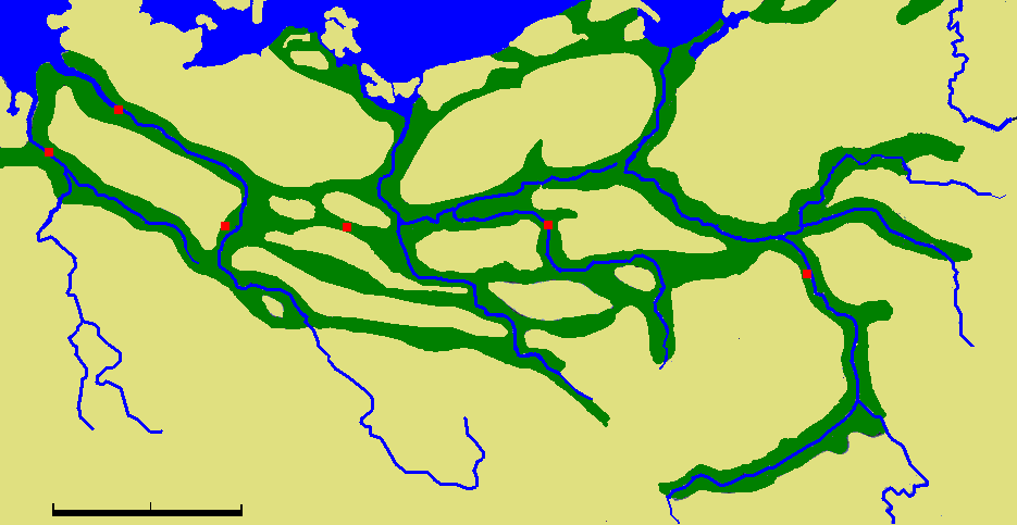 Ősfolyamvölgyek futása Közép-Európa északi részén